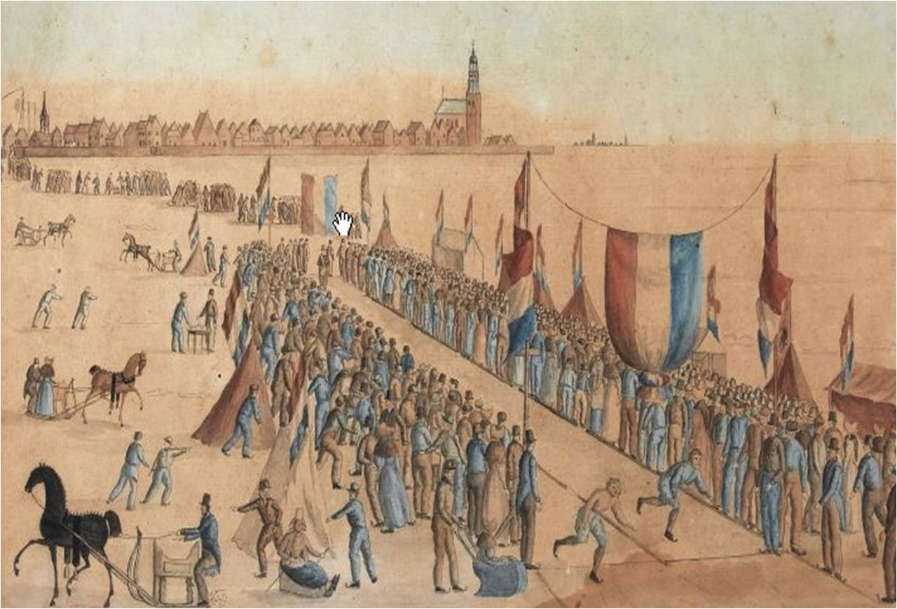 Kortebaanwedstrijd op de Zuiderzee nabij Hindelopen. De prent is afkomstig uit 1828. Vervaardiger onbekend. Hindelopen is op de achtergrond te zien.